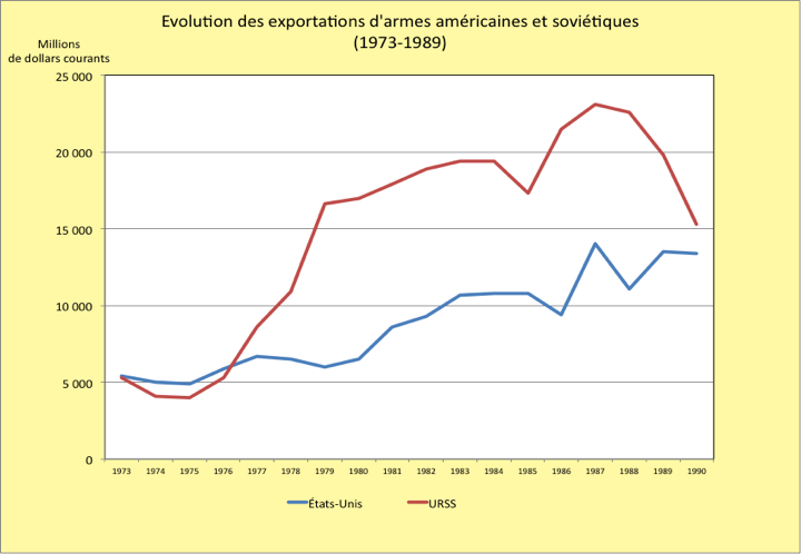 Graphique des exportations d'armes par les États-Unis et l'Union soviétique de 1973 à 1989. Les données source proviennent des rapports annuels "World Military Expenditures and Arms Transfers" publiés par le Département d'État américain